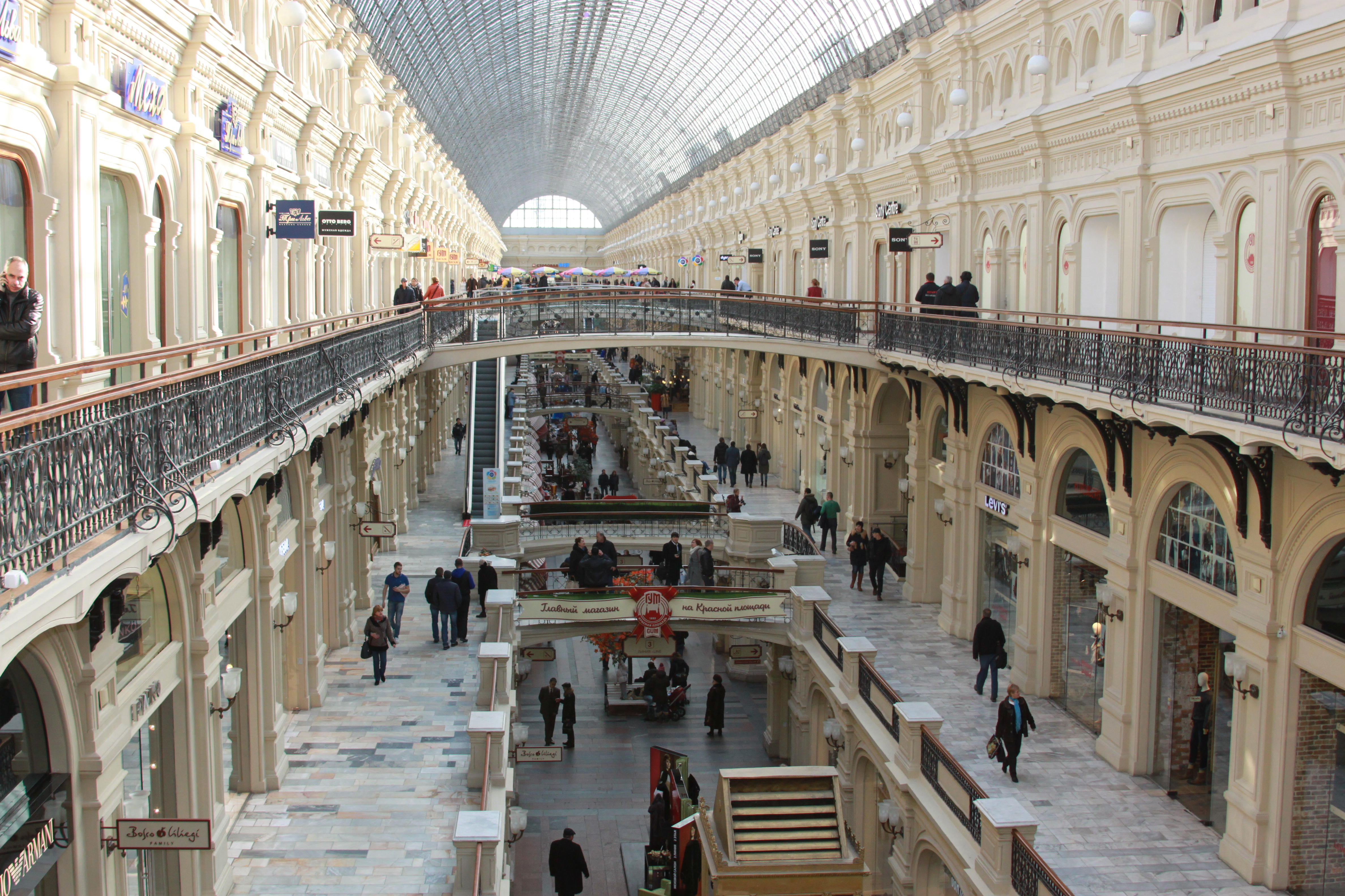 2014 Moscow GUM inside Москва Внутри ГУМа